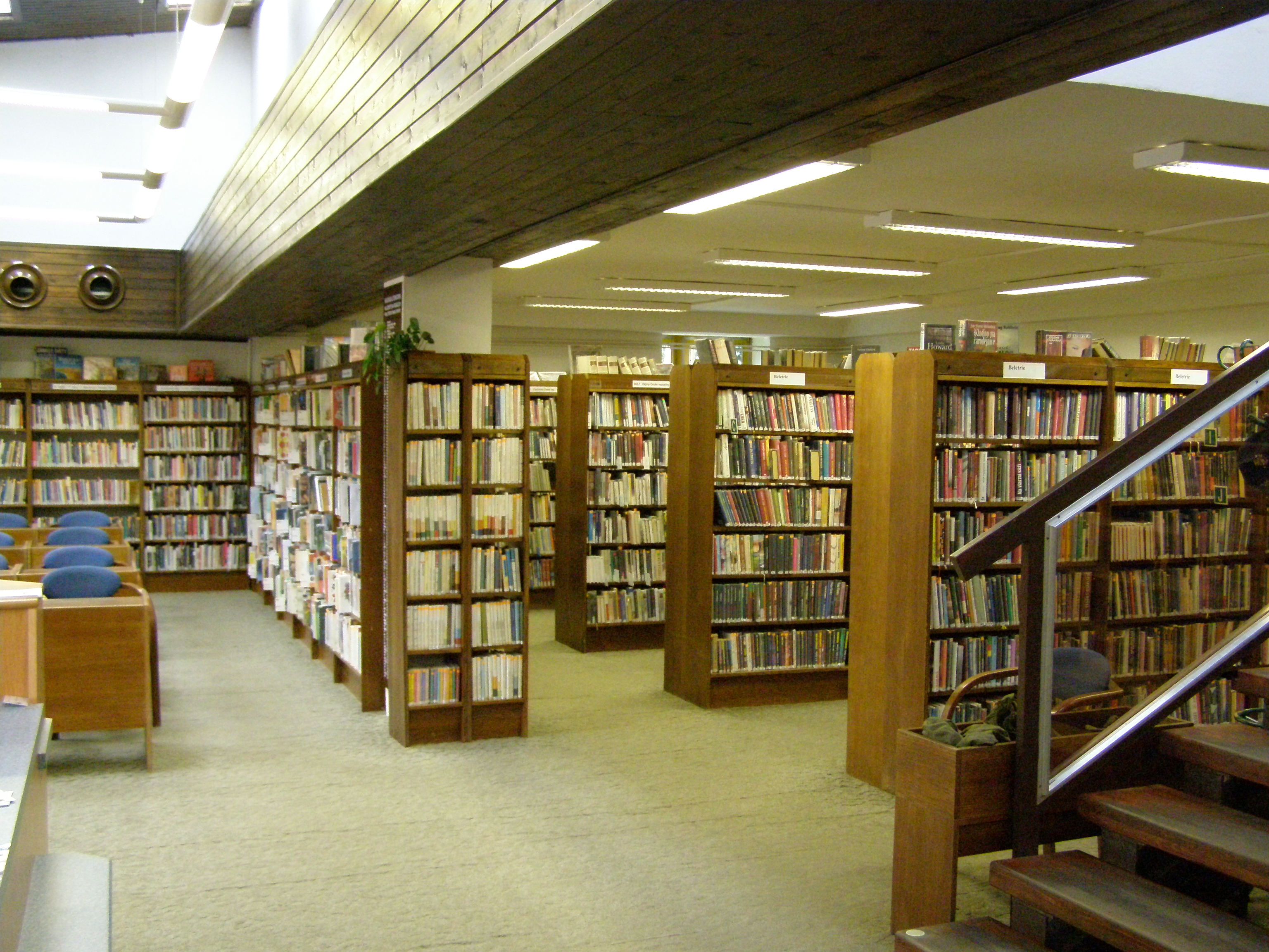 Interiér dospělého oddělení Městské knihovny Ústí nad Orlicí.